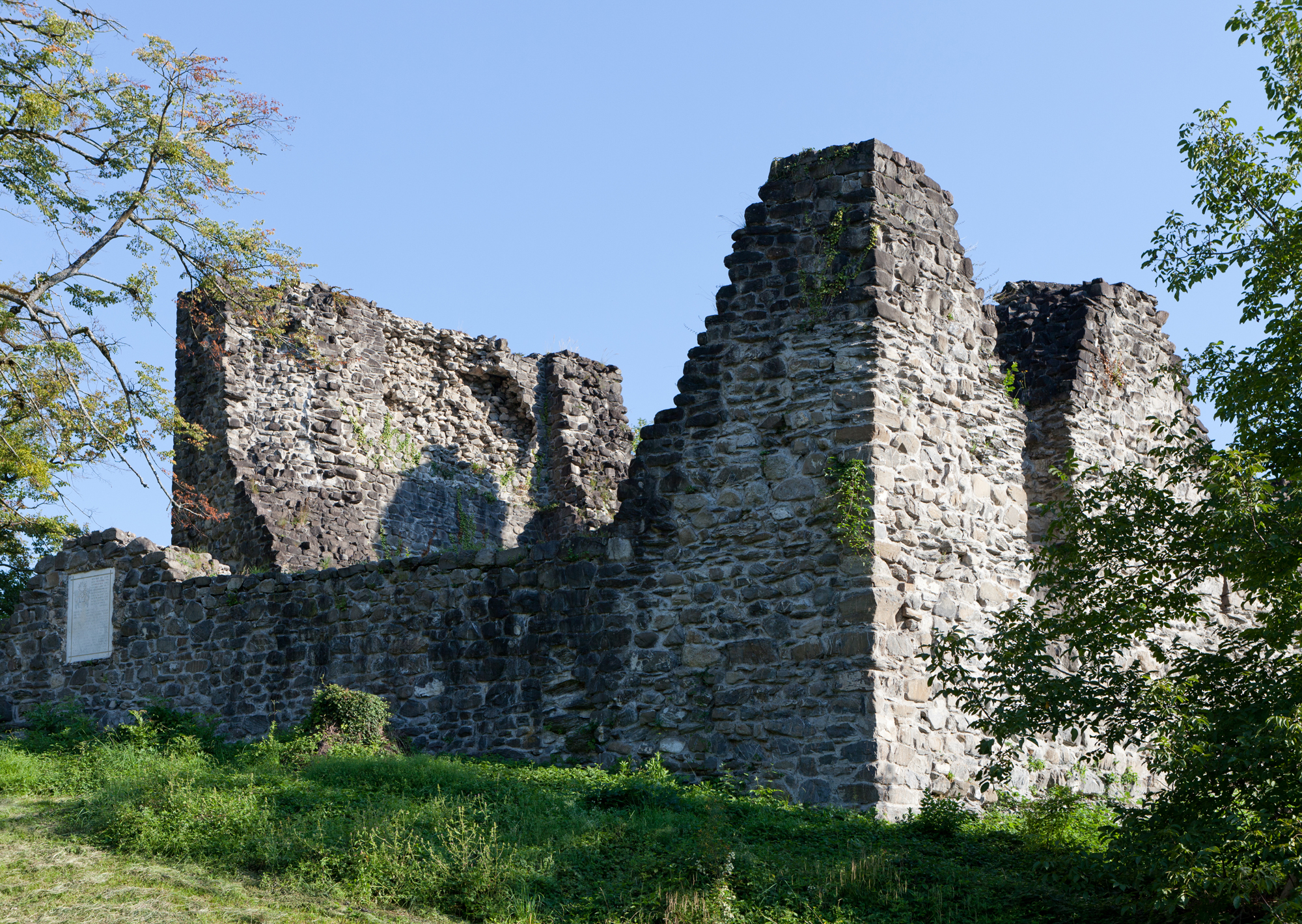 Ruine der Burg der Freiherren von Attinghausen